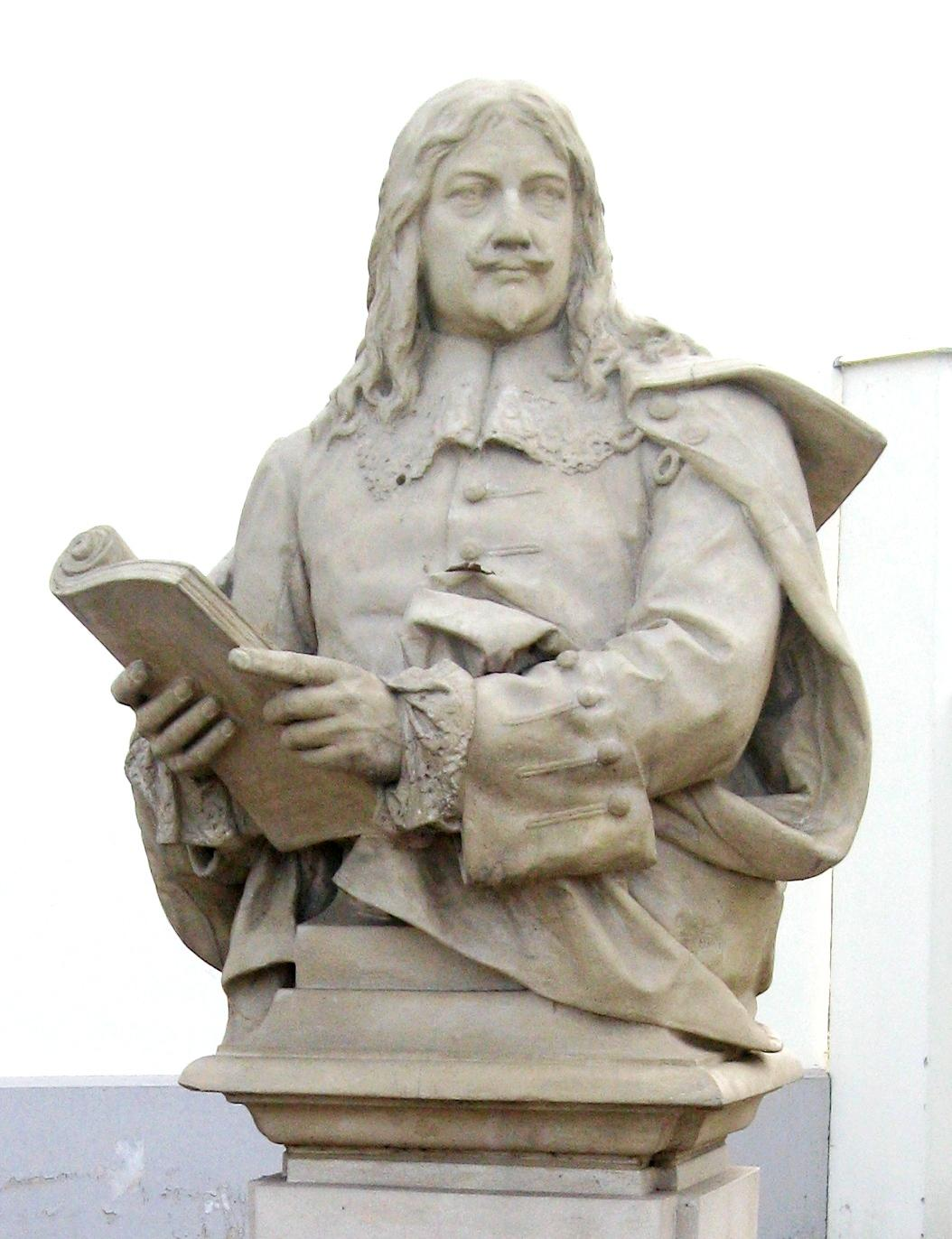 Denkmal für Otto von Schwerin am Schlossplatz in Oranienburg. Kopie von 2009 der Seitenbüste zur Figurengruppe 25 an der Berliner Siegesallee von Fritz Schaper von 1901.